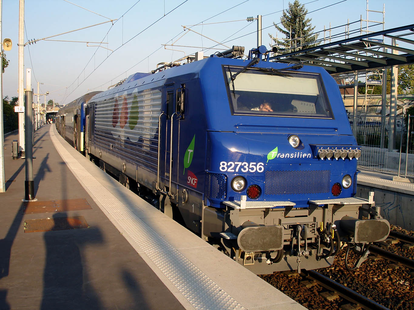 BB 27300 en gare d'Ermont - Eaubonne (Val-d'Oise)